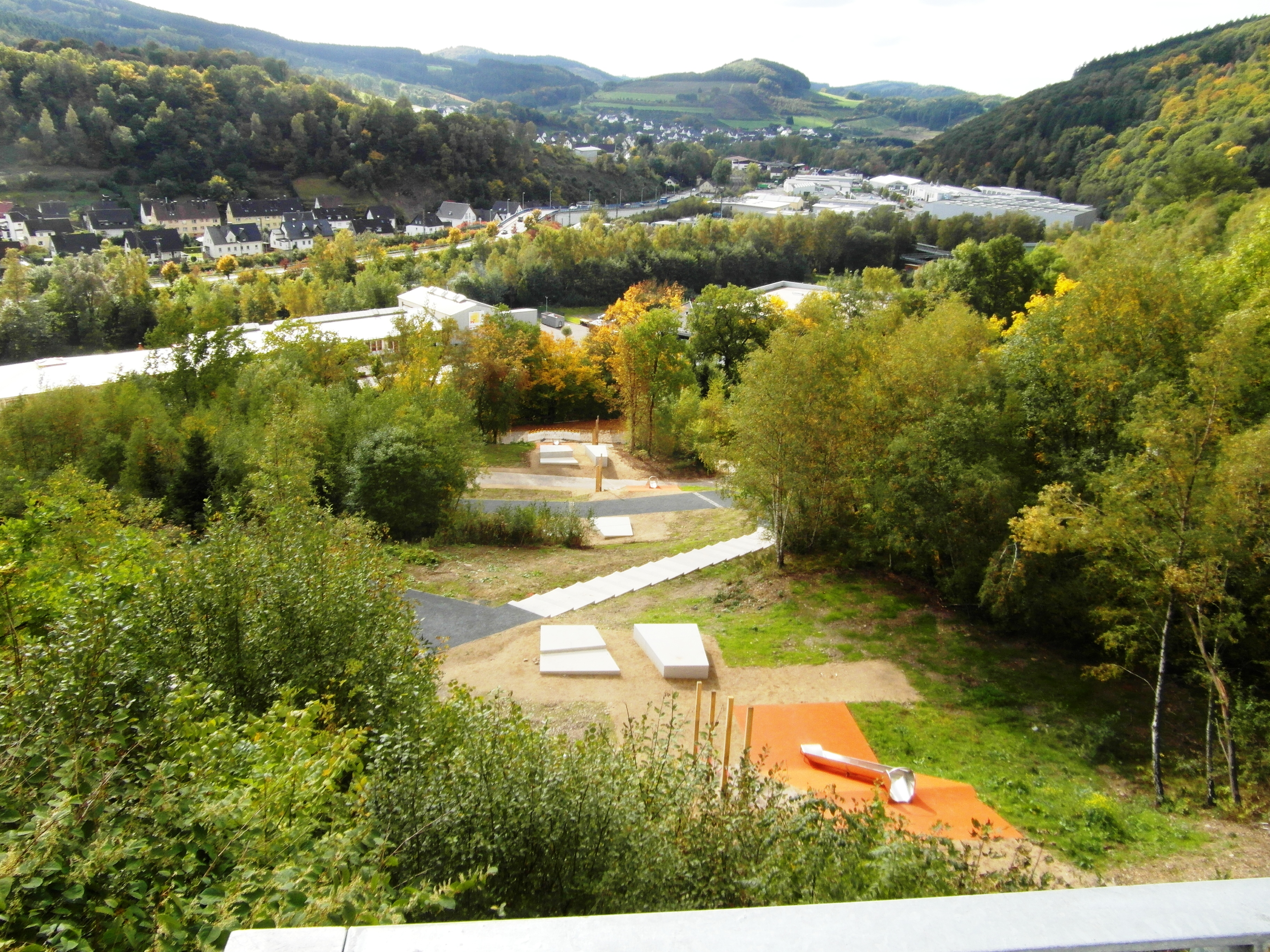 Blick von der Aussichtsplattform nahe Siciliaschacht auf den Haldengarten und den Ort Meggen